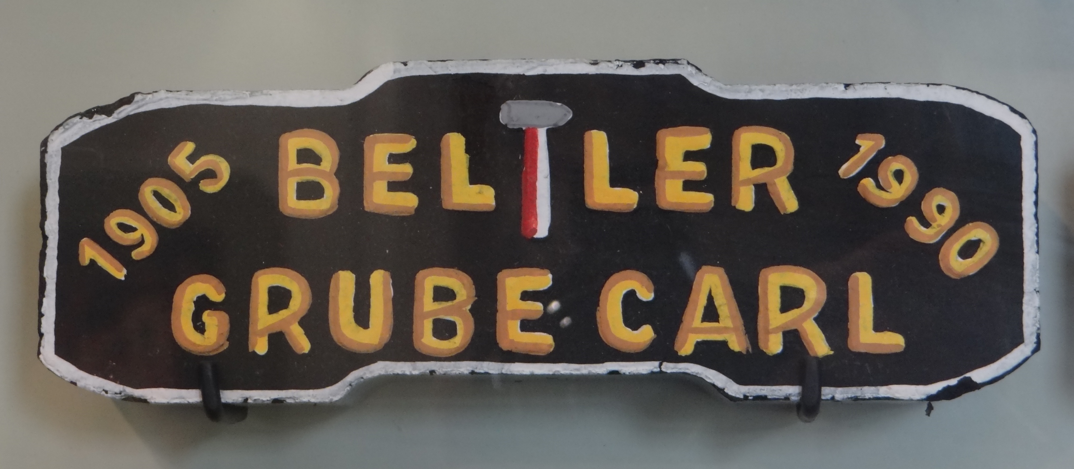 Deutsches Bergbau-Museum Bochum. Halle 19: Aufbereitung und Rohstoffveredlung. Kohlebrikettierung: Schmuckbriketts